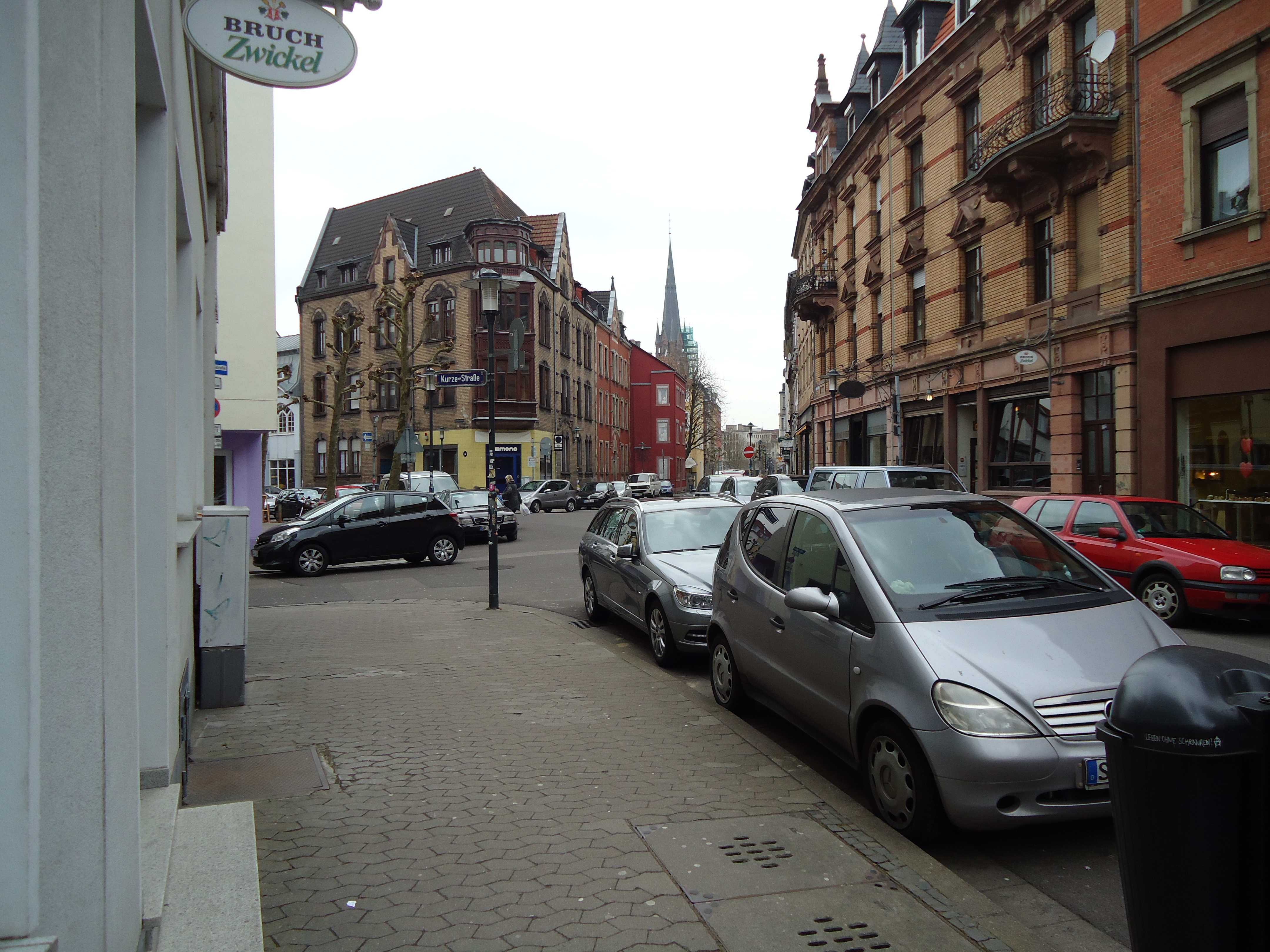 Eine typische Straßenszene im Nauwieser Viertel